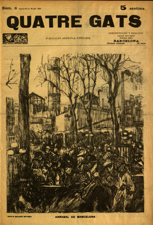 Revista Quatre Gats. Número 8. 30-Març-1899